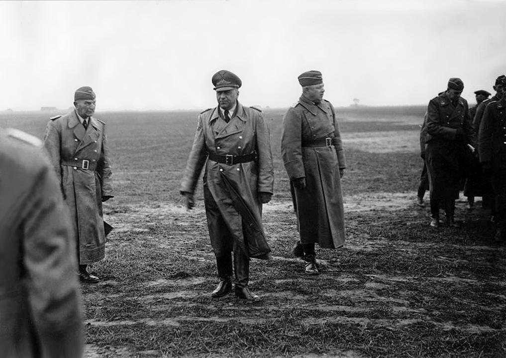 Garnizon Praschnitz (Przasnysz), 1941r. Inspekcja na lotnisku Generalleutnanta Hermana Brucha, któremu towarzyszył Komendantur E 35/XI Praschnitz Oberst Heinrich Rauch jako Fliegevhorst